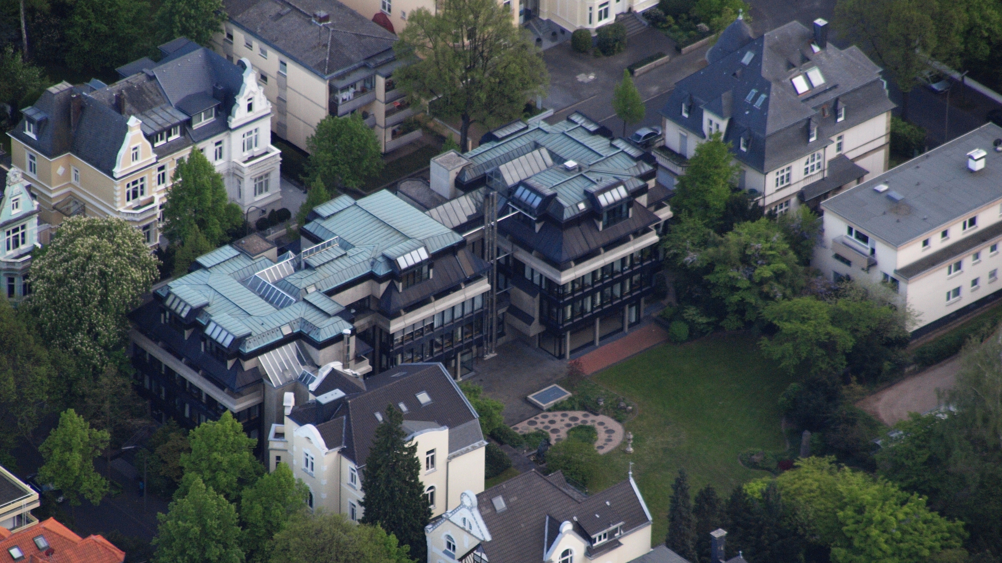 Alexander von Humboldt-Stiftung, Jean-Paul-Straße 12/Mirbachstraße 3–5, Bad Godesberg: Luftaufnahme